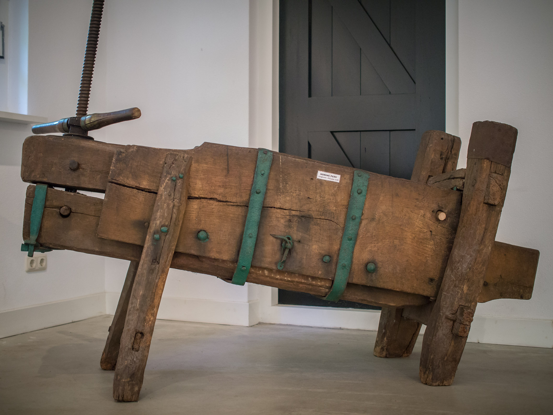 Openluchtmuseum Ellert en Bammert te Schoonoord - Honing pers